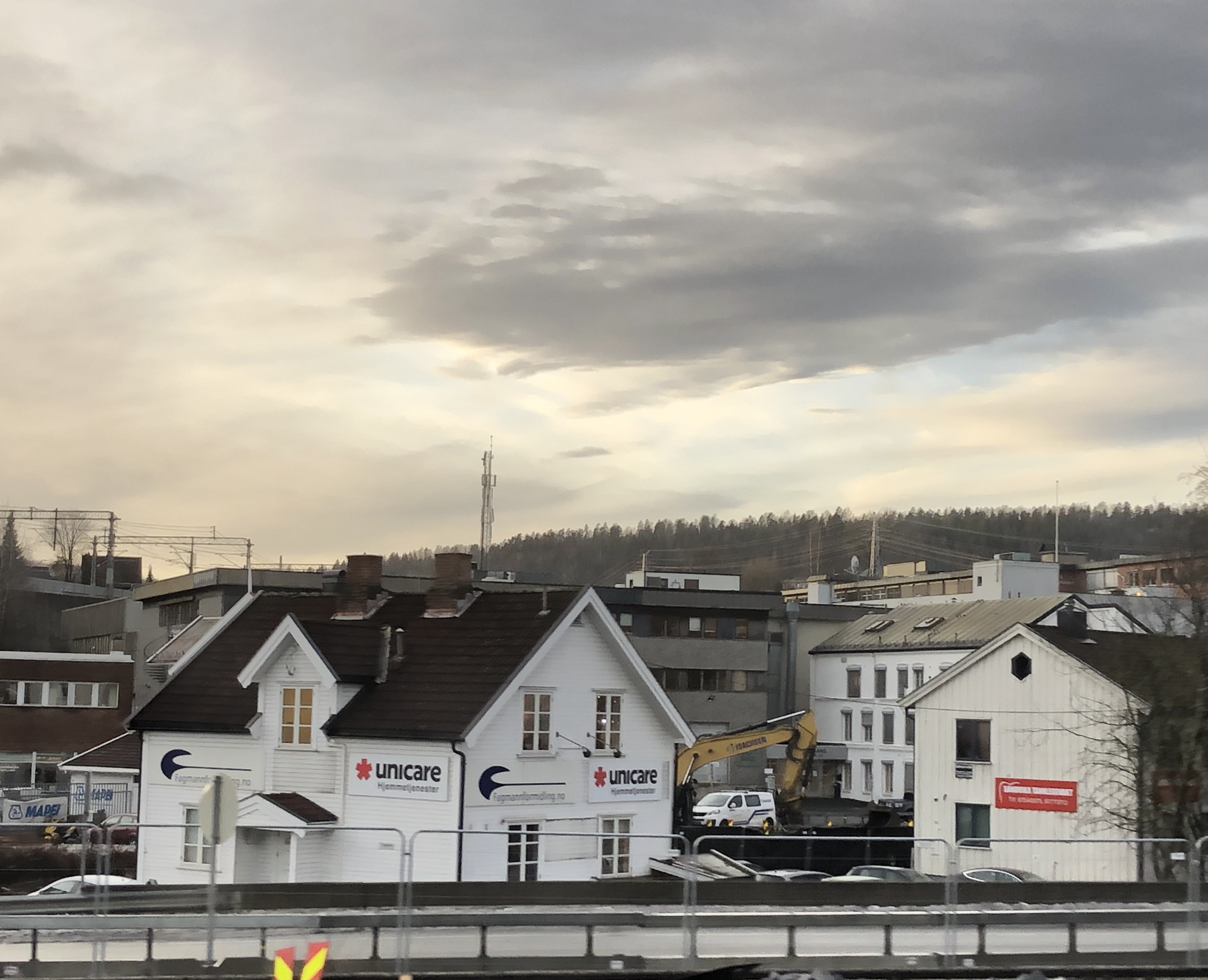 Industriveien 3, Sandvika